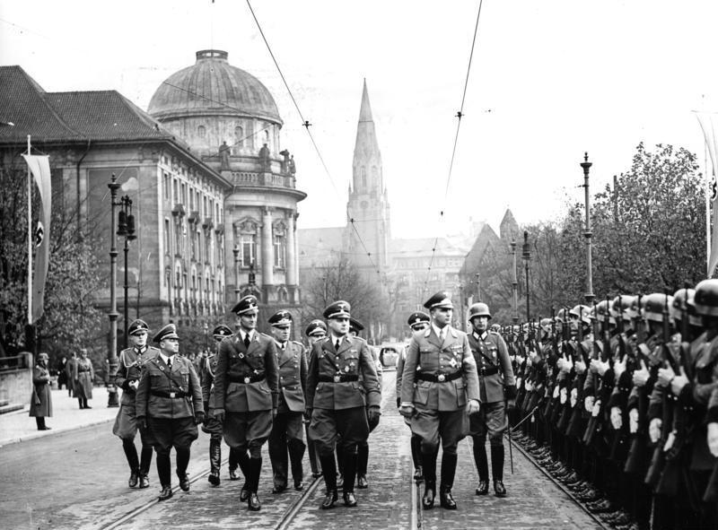 Posen, NS-Feierstunde, Ehrenkompanie Erste nationalsozialistische Feierstunde im befreiten Posen. Am Freitag fand im Posener Stadttheater die erste nationalsozialistische Feierstunde statt, der als Ehrengäste die Hinterbliebenen der von den Polen ermordeten Volksdeutschen beiwohnten. U.B.z.: Reichsstatthalter Greiser und SS-Gruppenführer Koppe schreiten bei ihrem Eintreffen vor dem Stadttheater die Front der Ehrenkompanie der Wehrmacht ab. Fot. Ho. 4.11.39 12957-39 Abgebildete Personen: Greiser, Arthur: Senatspräsident von Danzig, Gauleiter Warthegau, Deutschland Koppe, Wilhelm: SS-Gruppenführer, Deutschland